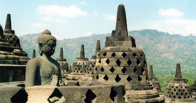 Fotograf: Michel Estermann, August 2000, GNU Freie Dokumentationslizenz